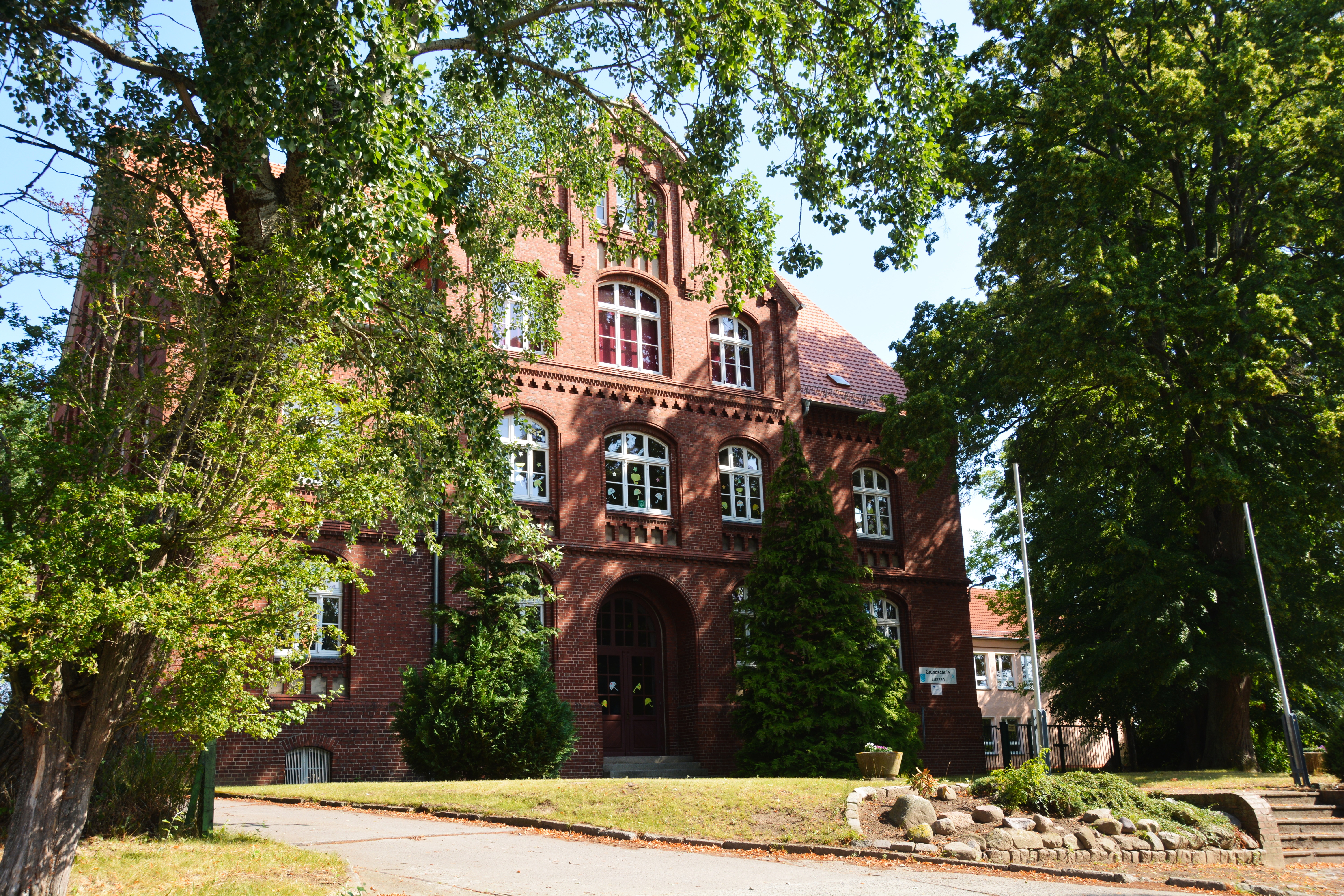 Grundschule Lassan (17389 Wolgast)